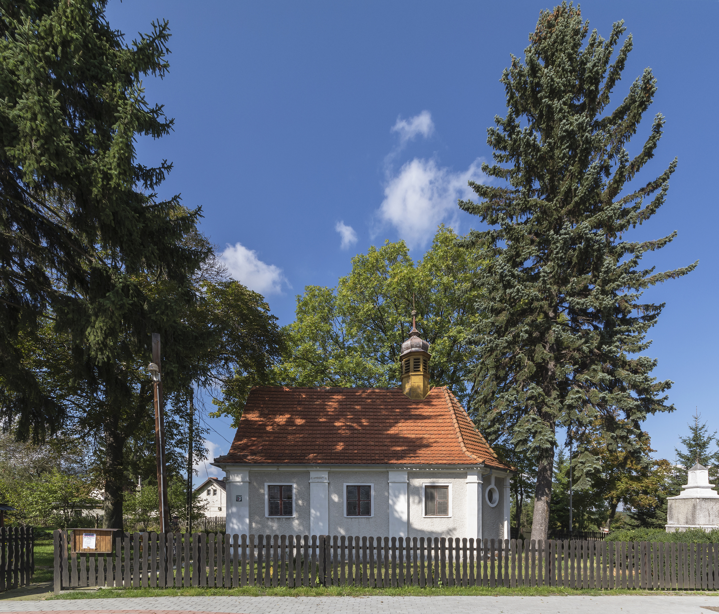 Polanica-Zdrój, kaplica pomocnicza p.w. św. Antoniego, XVIII